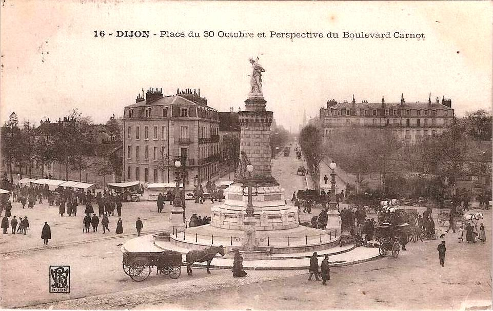 Carte postale ancienne n°16 : DIJON - Place du 30 Octobre